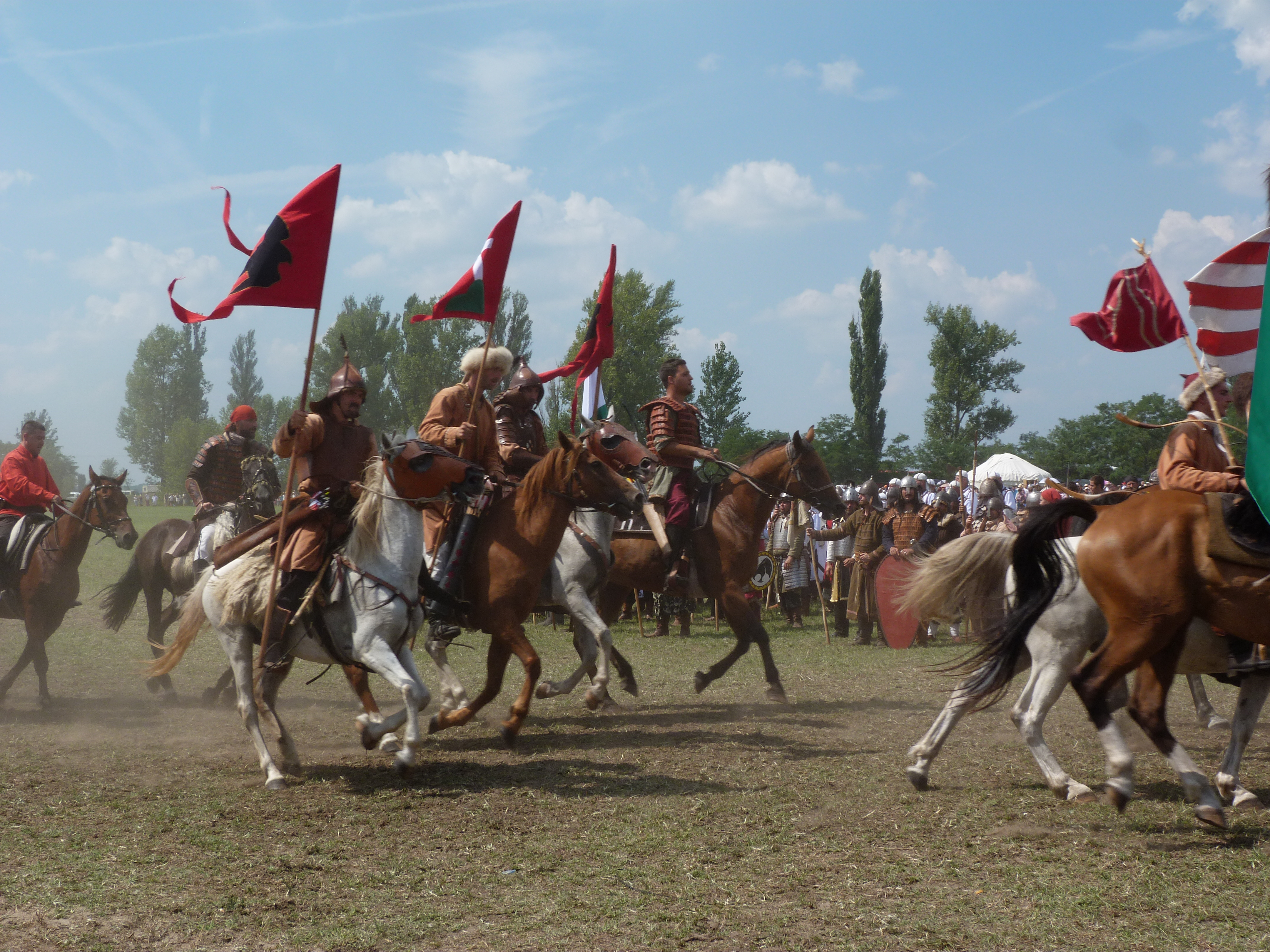 A felvétel 2014. augusztus 9-én, szombaton készült Bugacon. Kurultáj, magyar törzsi gyűlés. ©© Derzsi Elekes Andor, Budapest 2014, You are authorised to use these photos and vids under Creative Commons – even for commercial, for profit purposes. Photos must be attributed to Derzsi Elekes Andor. All of the photos and vids in the Metapolisz DVD line are under Creative Commons and can be used even for commercial – for profit – purposes. Recommended Citation Derzsi Elekes Andor: Metapolisz DVD line